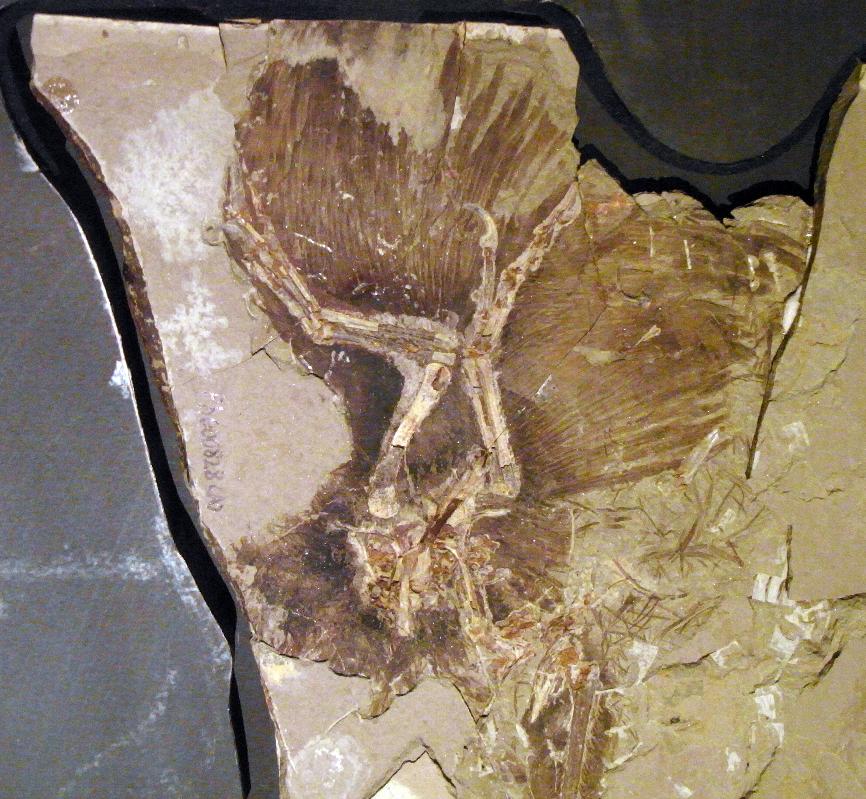 アンキオルニスの羽毛がこんなにきれいに残ってる！ Anchiornis huxleyi specimen BMNHC PH828.